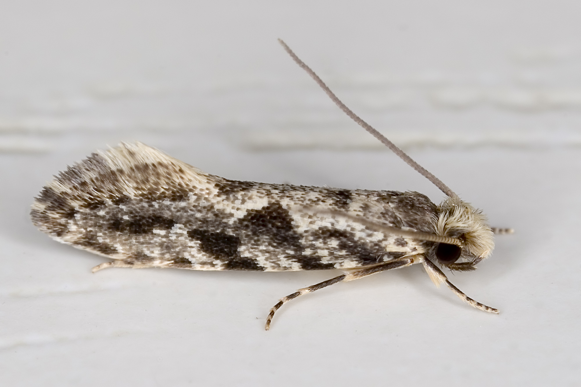 Nemapogon granella (Linnaeus 1758)